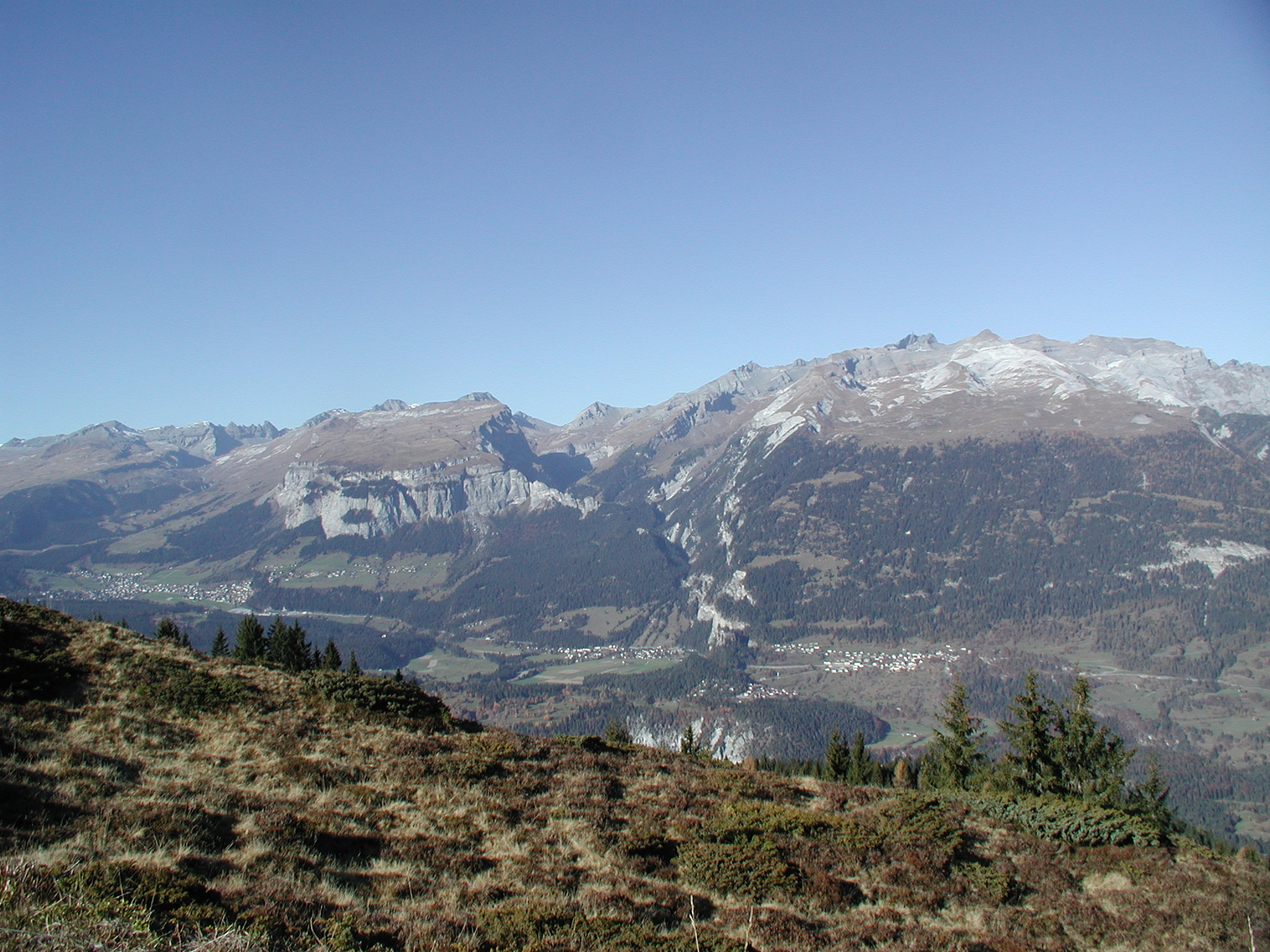 Blick vom Bot da la Crusch auf der Alp Sura bei Bonaduz gegen Nordwesten: Flimserstein, Trin, Ringelspitz.